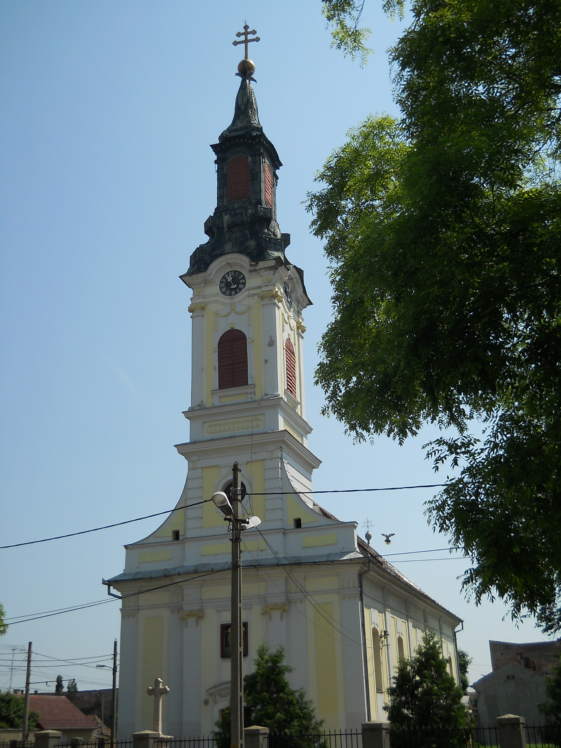 Biserica sârbească din Arad